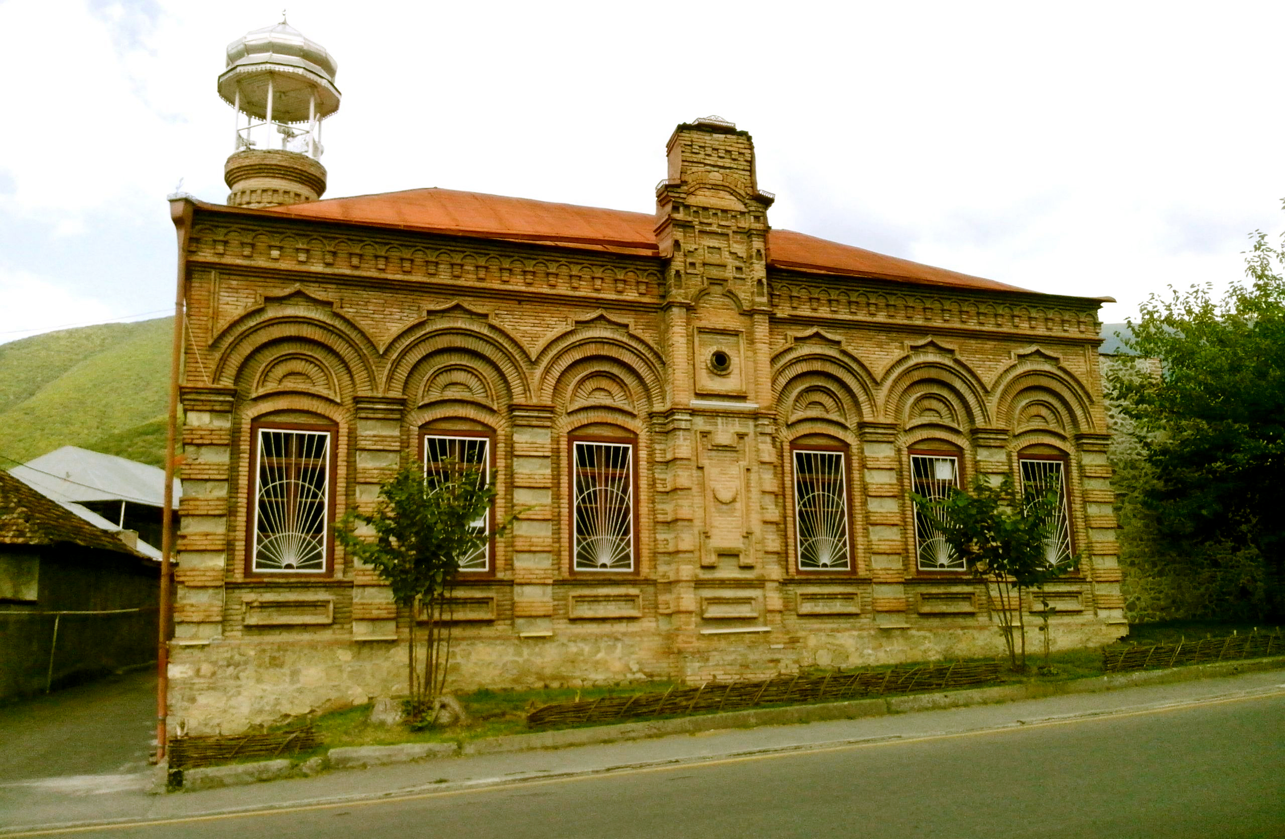 Şəki şəhərində XIX əsrə aid Ömər Əfəndi məscidi